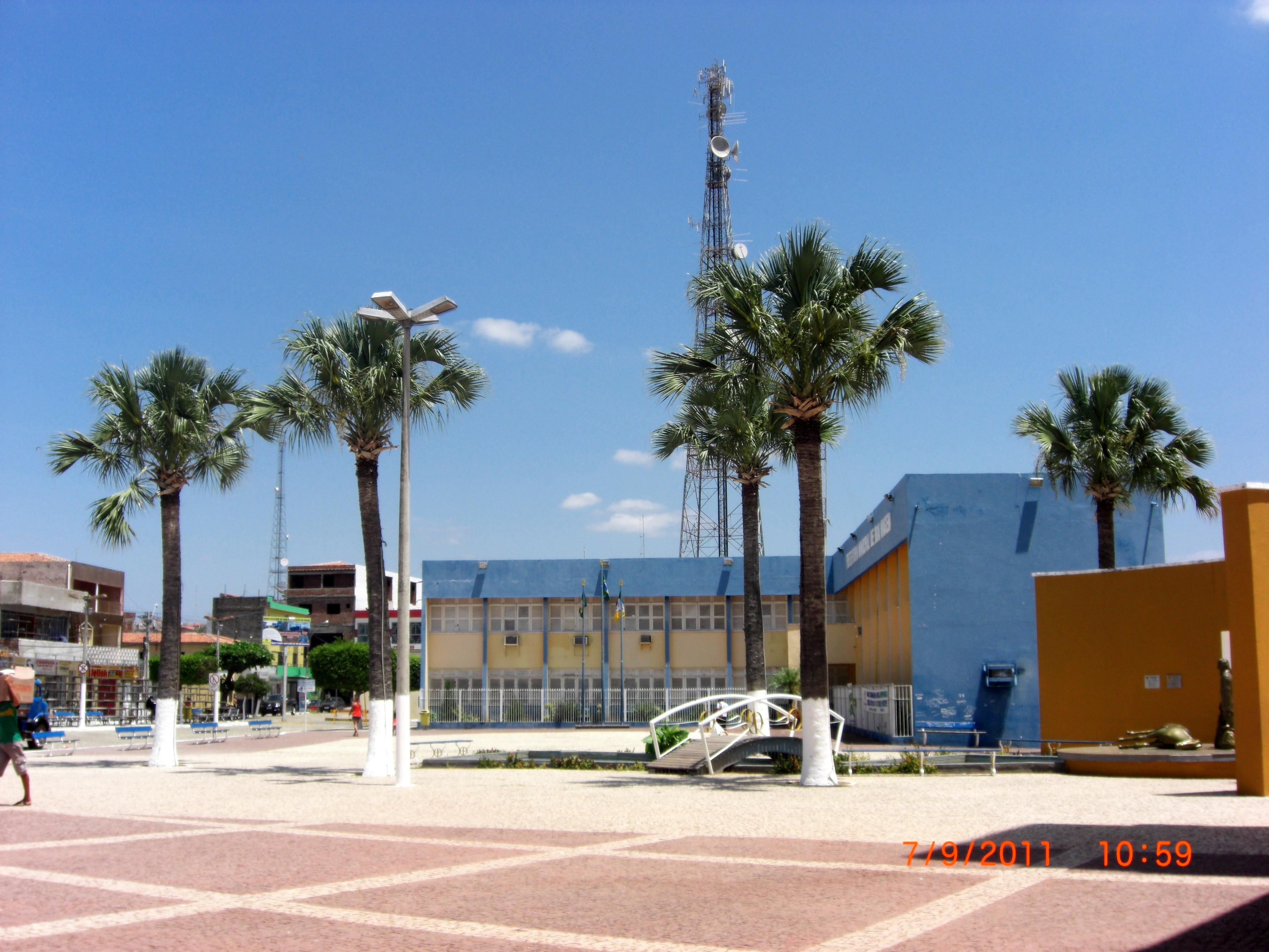 Prefeitura Municipal de Boa Viagem, Ceará, Brasil.